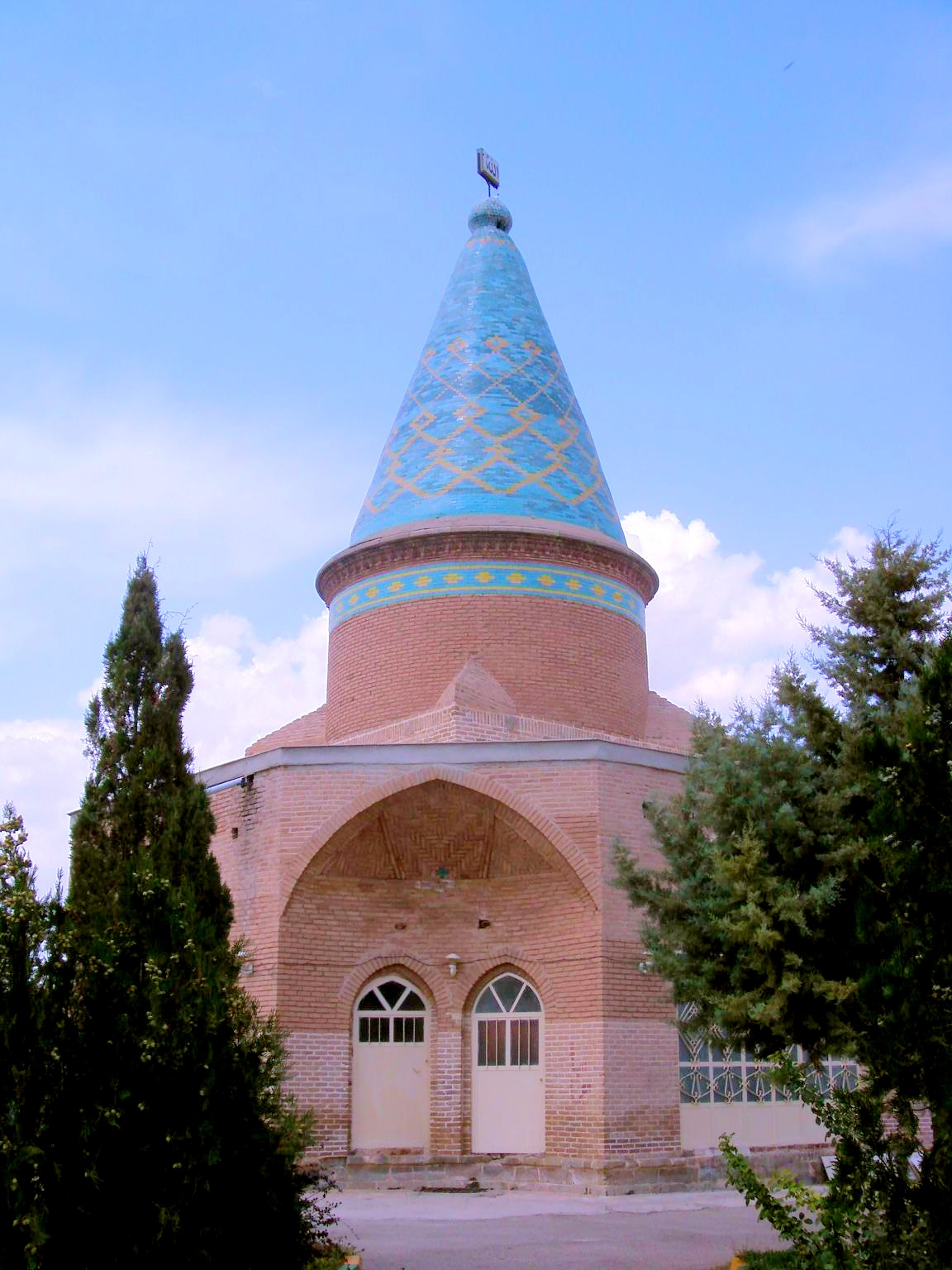 Imamzadeh Zeydolkabir, Abhar, Iran